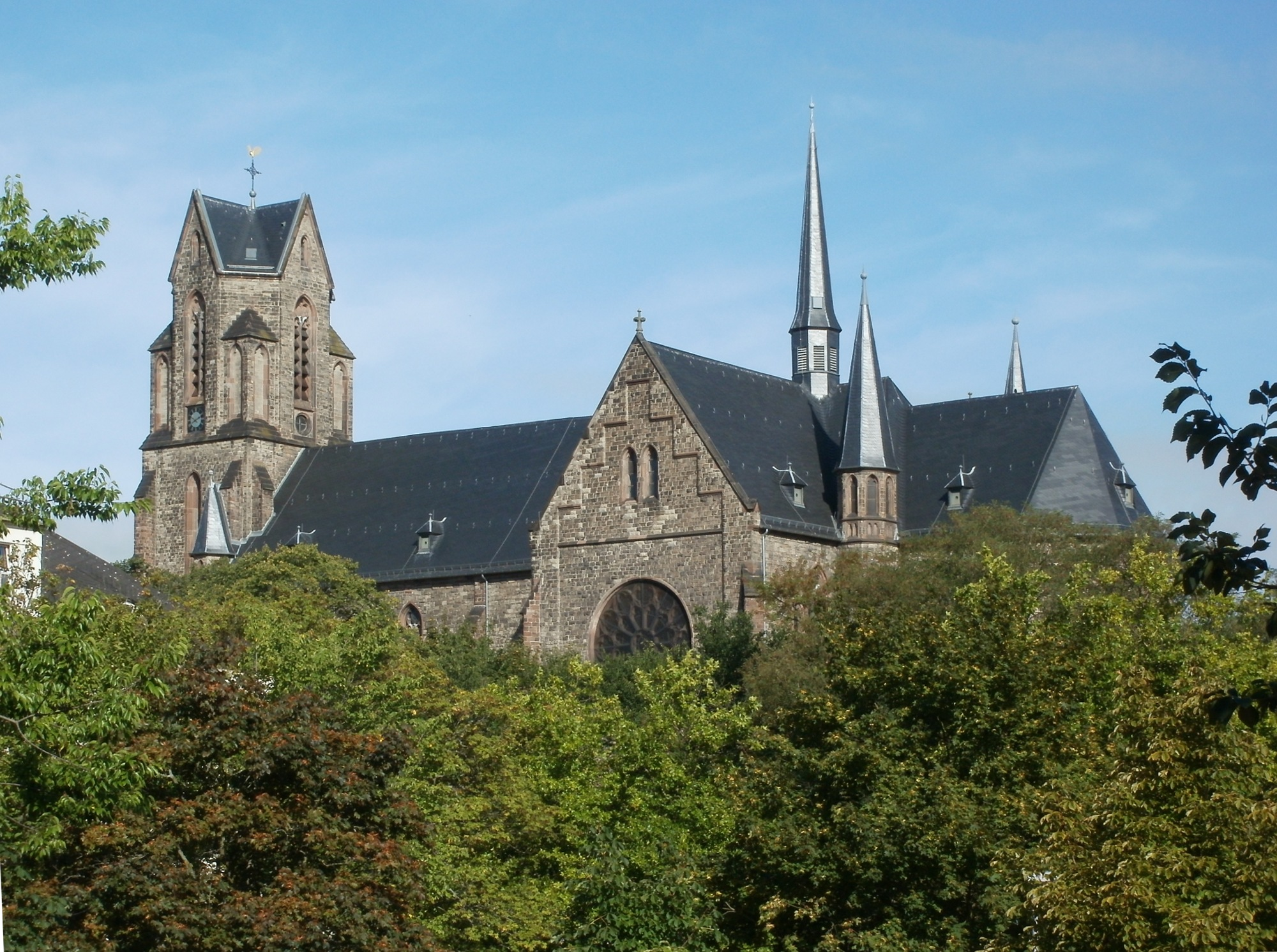 St. Josef (Saarbrücken)